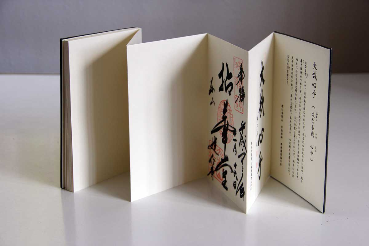 Livre en éventail